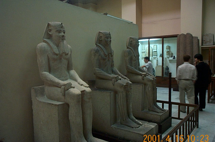 I. Szenuszert szobrai (Kairó, Egyiptomi Múzeum)